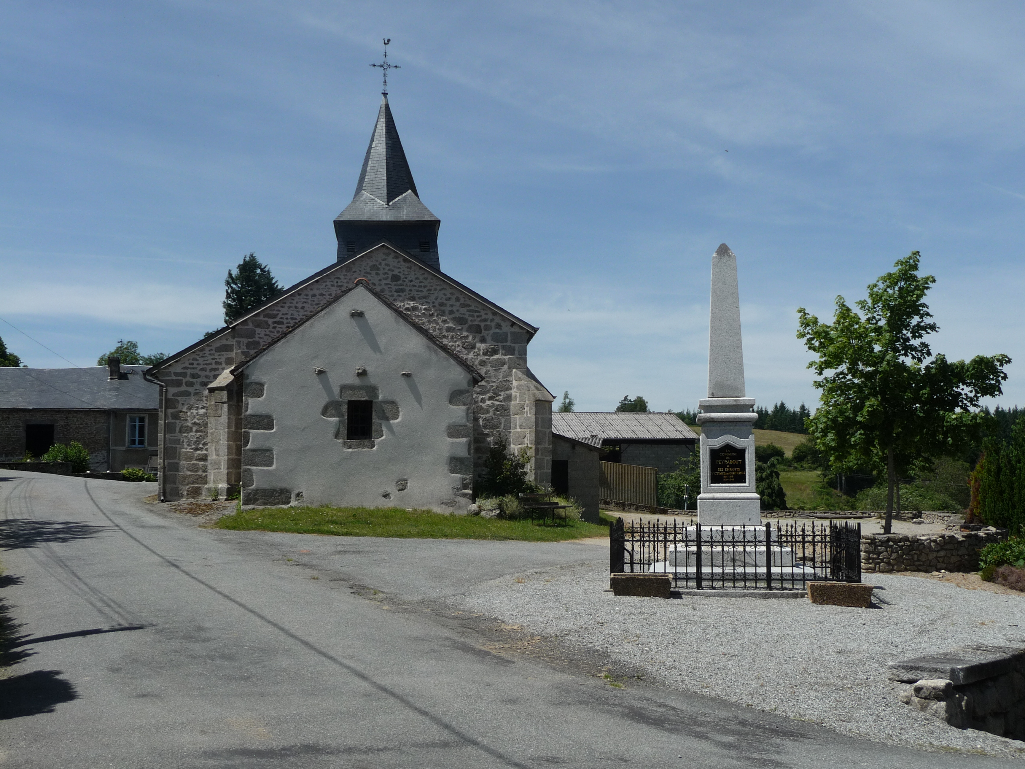 Peyrabout, vue du monument aux morts et de l'église